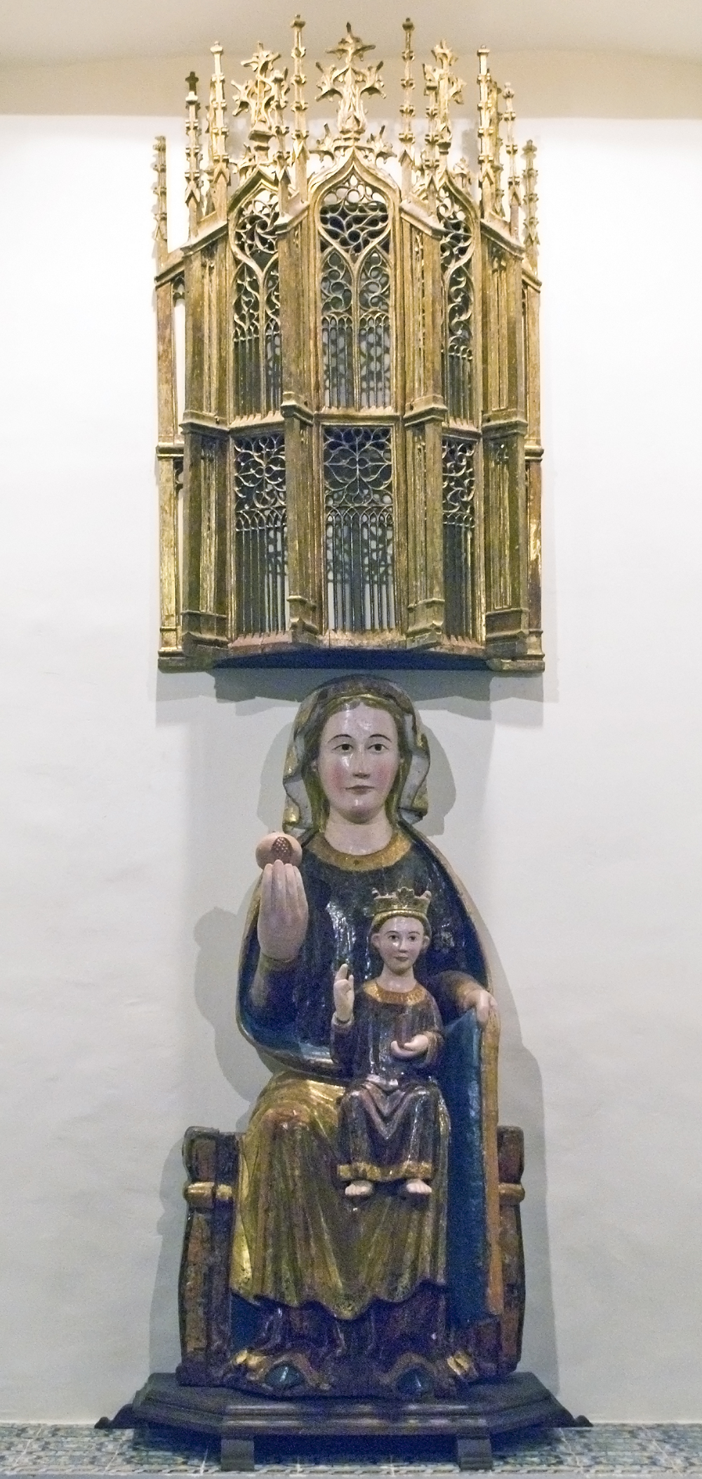 La obra representa a la Virgen María y a su hijo, el Niño Jesús, que aparece descansando en las rodillas de su madre.